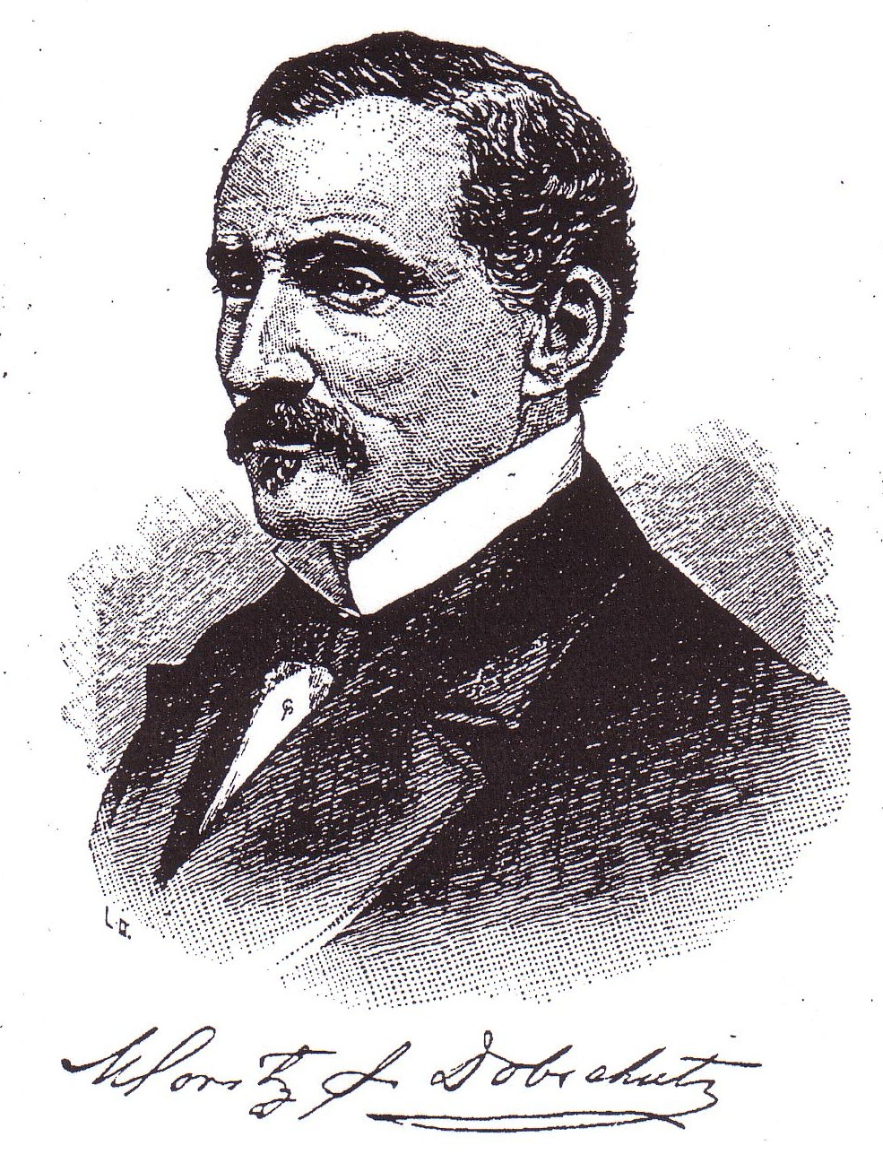 Moritz J. Dobschutz alias Moritz Julius von Dobschütz (1831-1913)